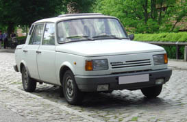 Wartburg, sedanmodell, fyra dörrar